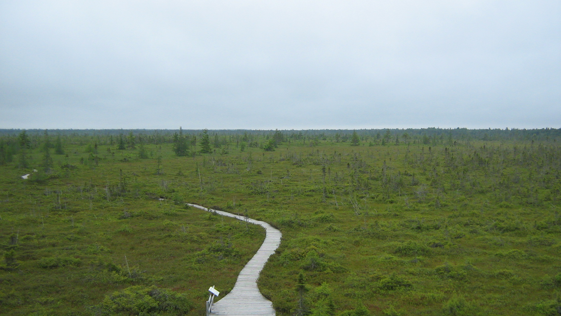 Sentier La Tourbière dans le parc national de Kouchibouguac